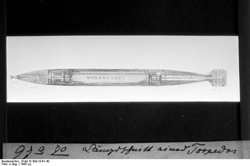 Fiume-Torpedo-Längsschnitt 97 a 70 Längsschnitt eines Torpedos [Torpedo-Längsschnitt eines Fiume-Torpedos]